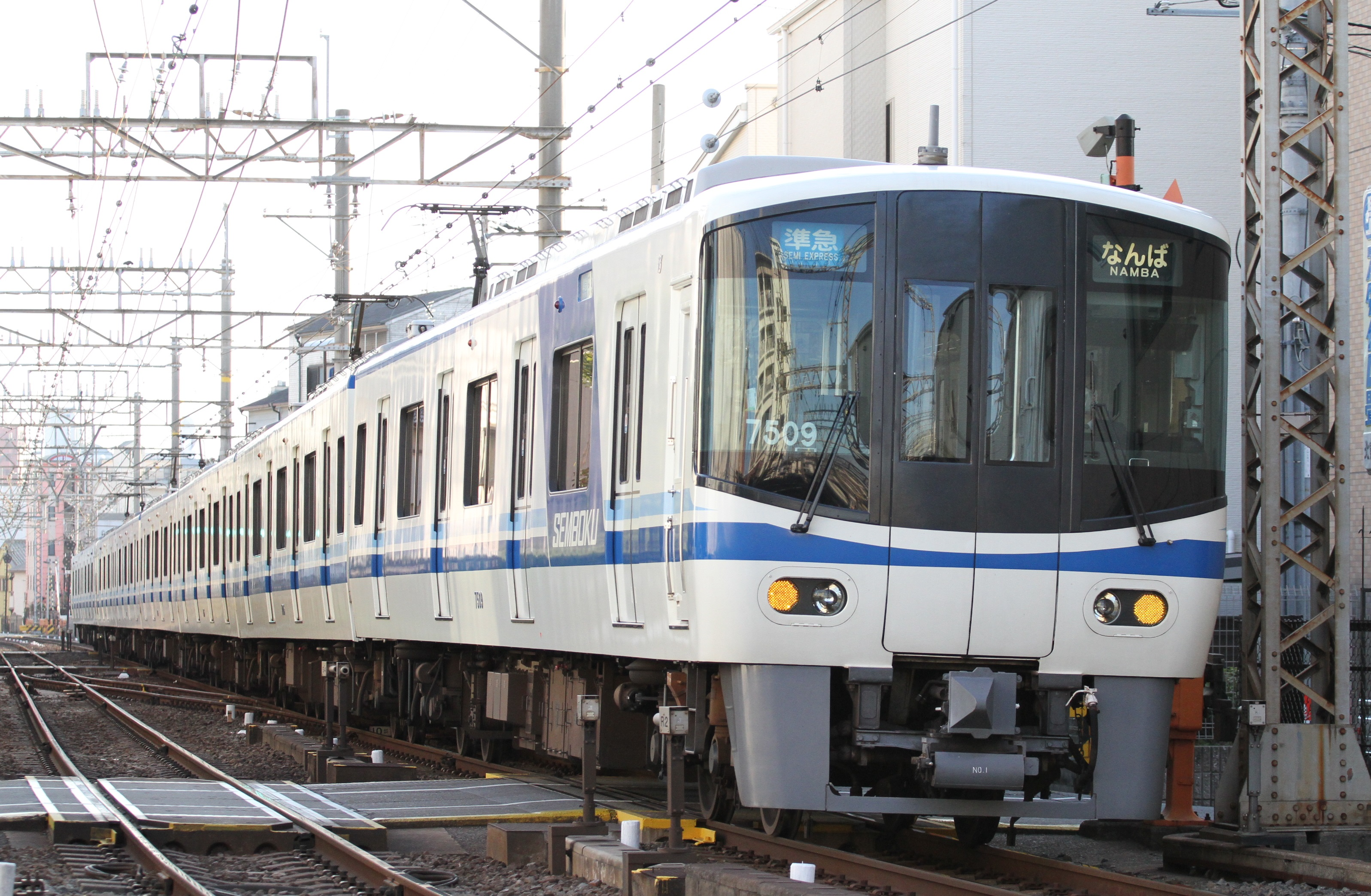 泉北高速鉄道7000系 7509以下8両編成（住吉東駅付近）